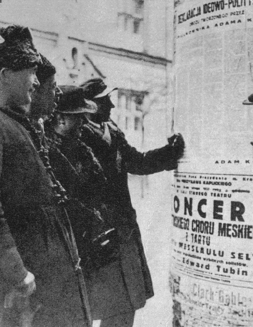 Deklaracja ideowa OZN w lutym 1937 r.